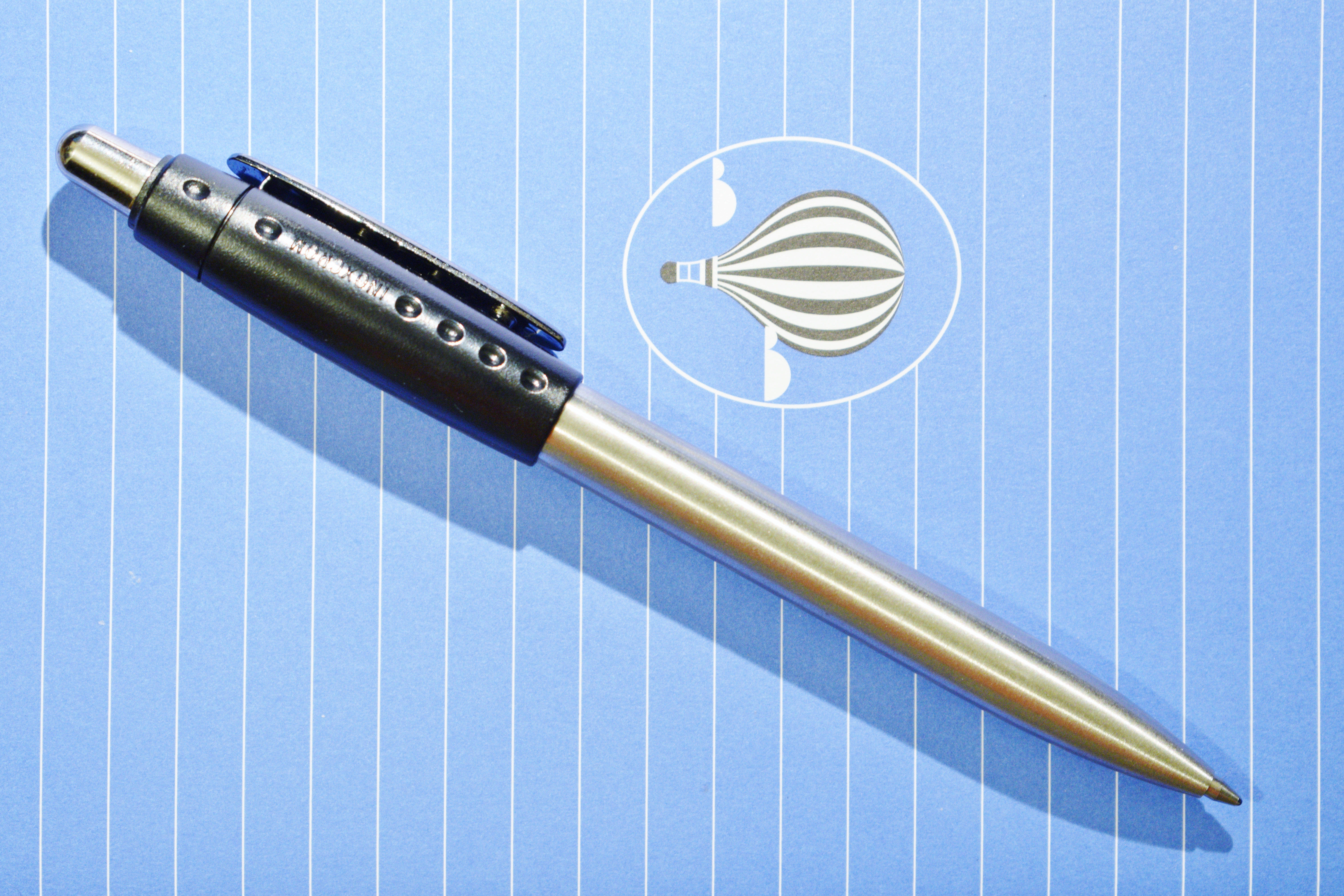 Bolígraf Inoxcrom ID